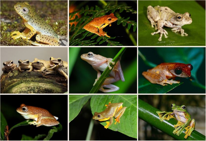 Rozmanitost létavkovitých